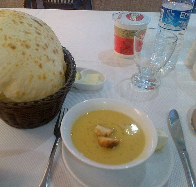 Crema de lentejas rojas turca ("Mercimek çorbası)" y un pide (pan) tipo "puf" en un restaurante.